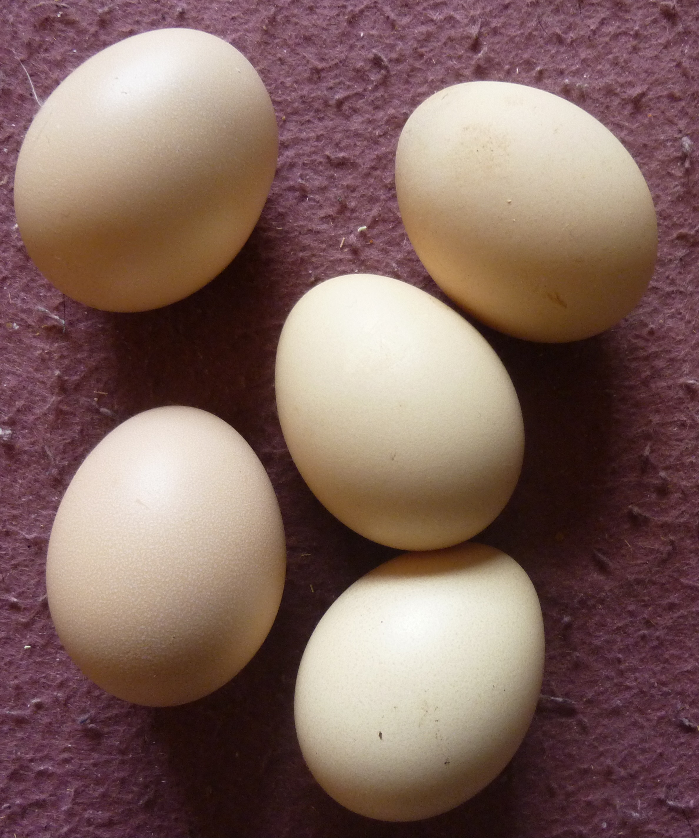 烏骨鶏の卵です